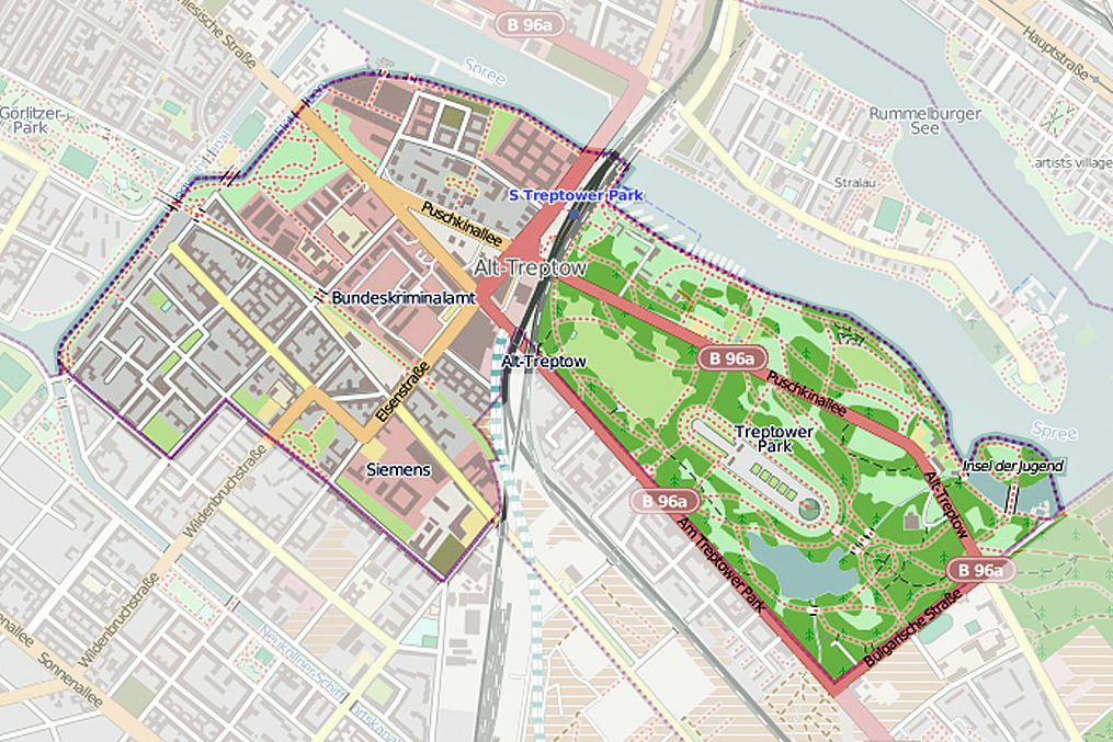 Übersicht der Straßen des Berliner Ortsteils Alt-Treptow, aus OpenStreetMap, farblich etwas überarbeitet.